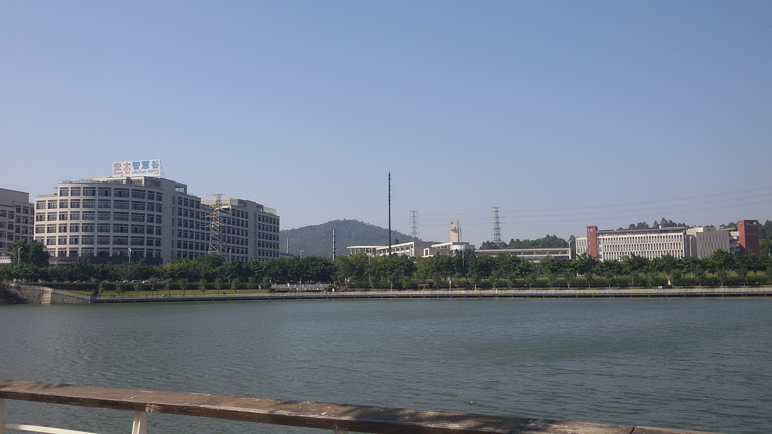 粵語: 宏太智慧谷